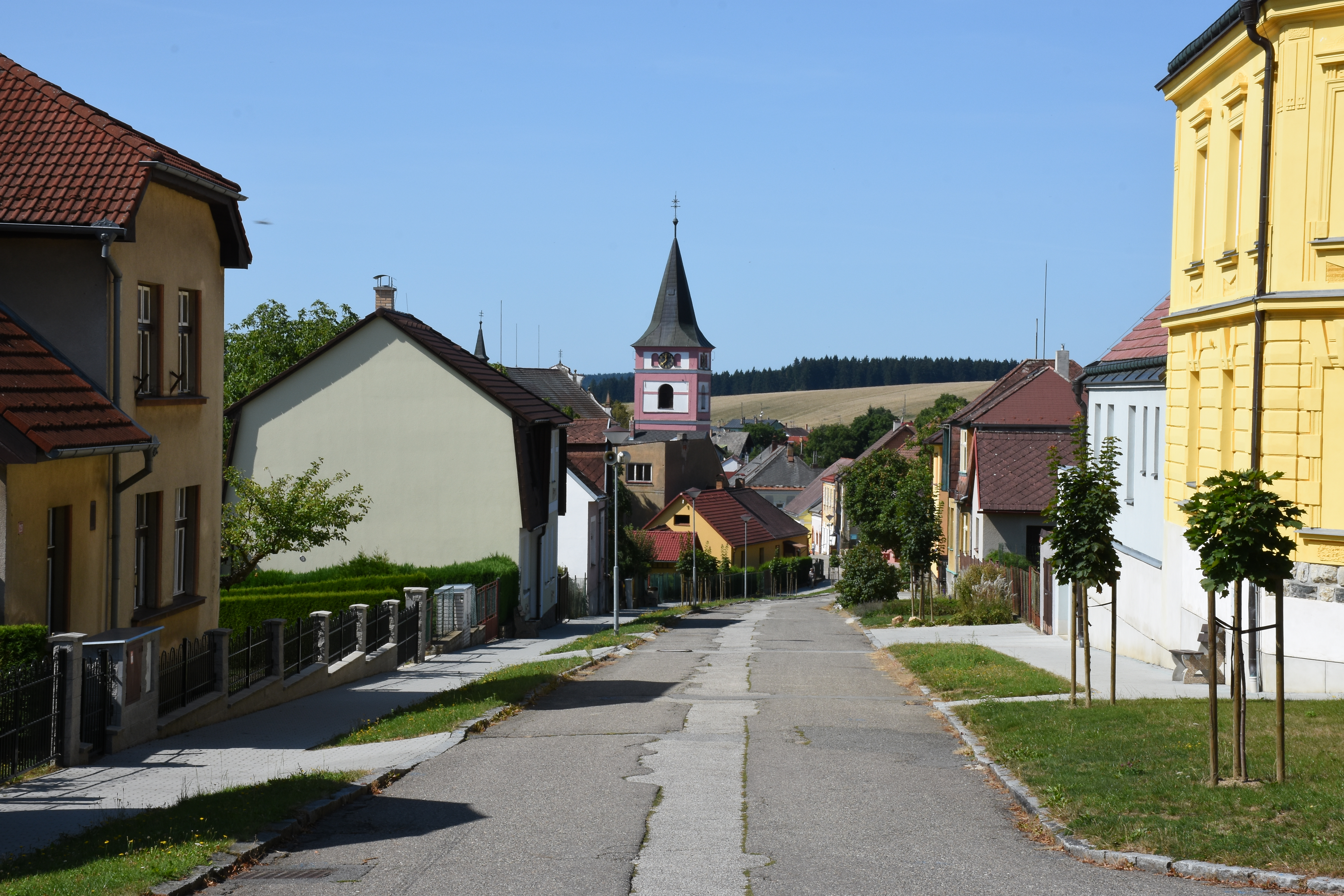 Černovice, okres Pelhřimov. Nádražní ulice, pohled k náměstí od východu směrem od nádraží.